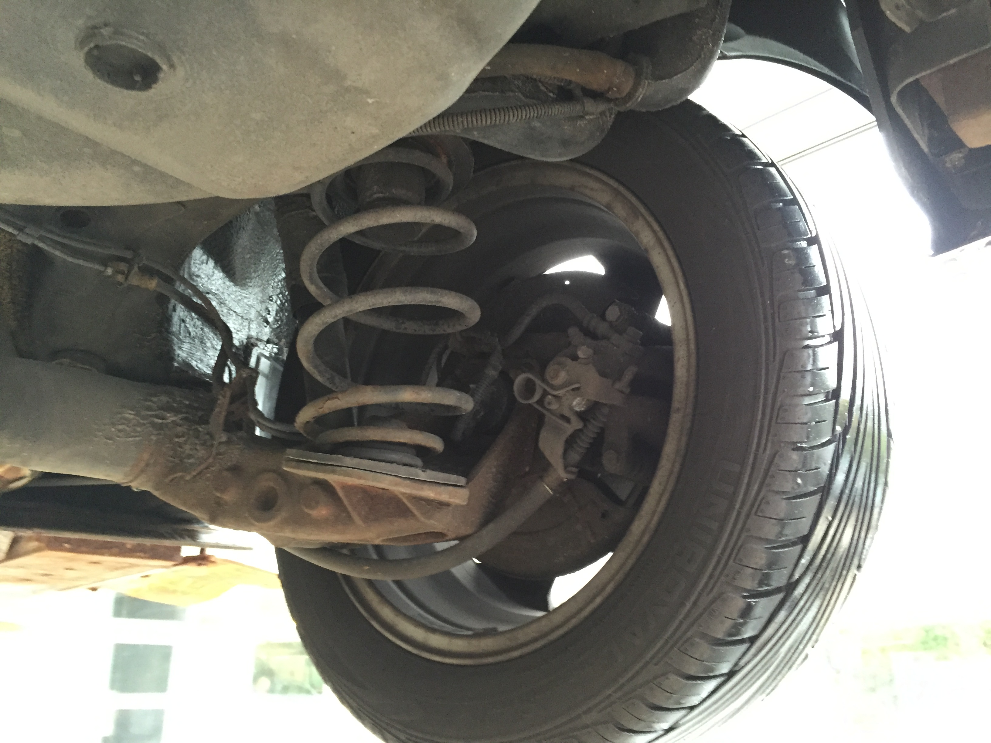 hintere Radaufhängung Opel Astra G